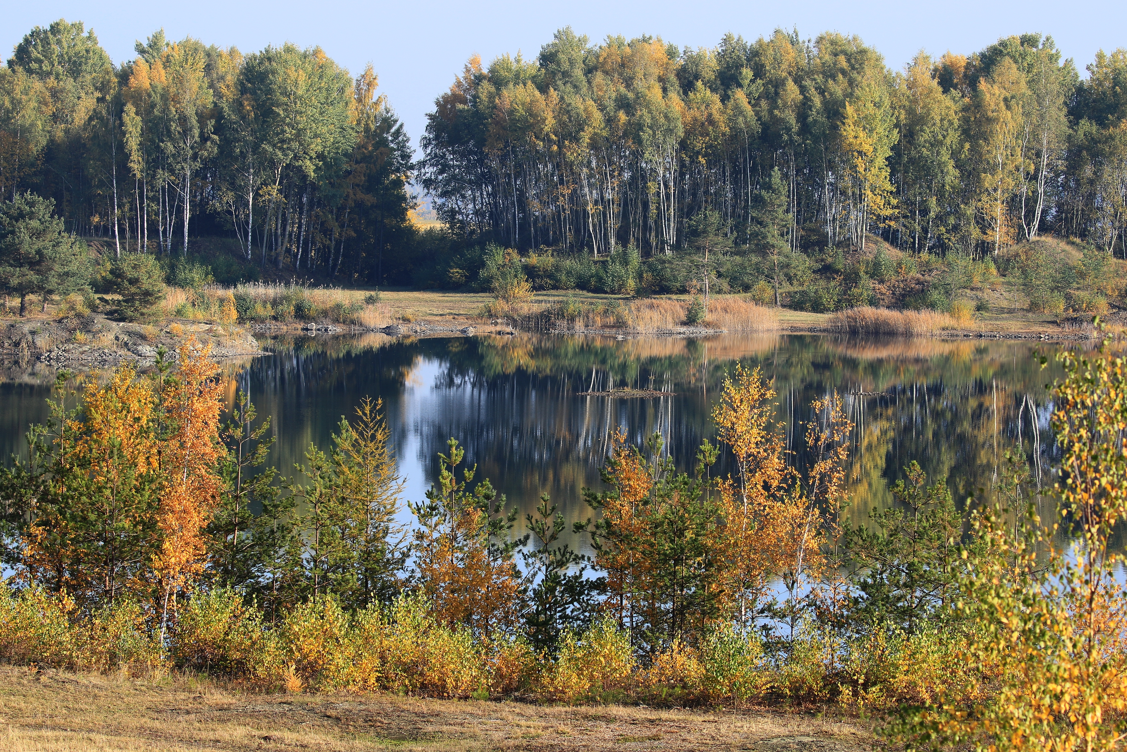 Naturschutzgebiet der ehemaligen Nickelgrube Callenberg Nord II in Sachsen; Kreis Zwickau.